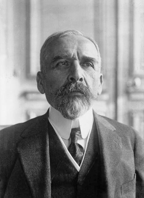 M. Maunoury, Ministre de l'Intérieur : photographie de presse.